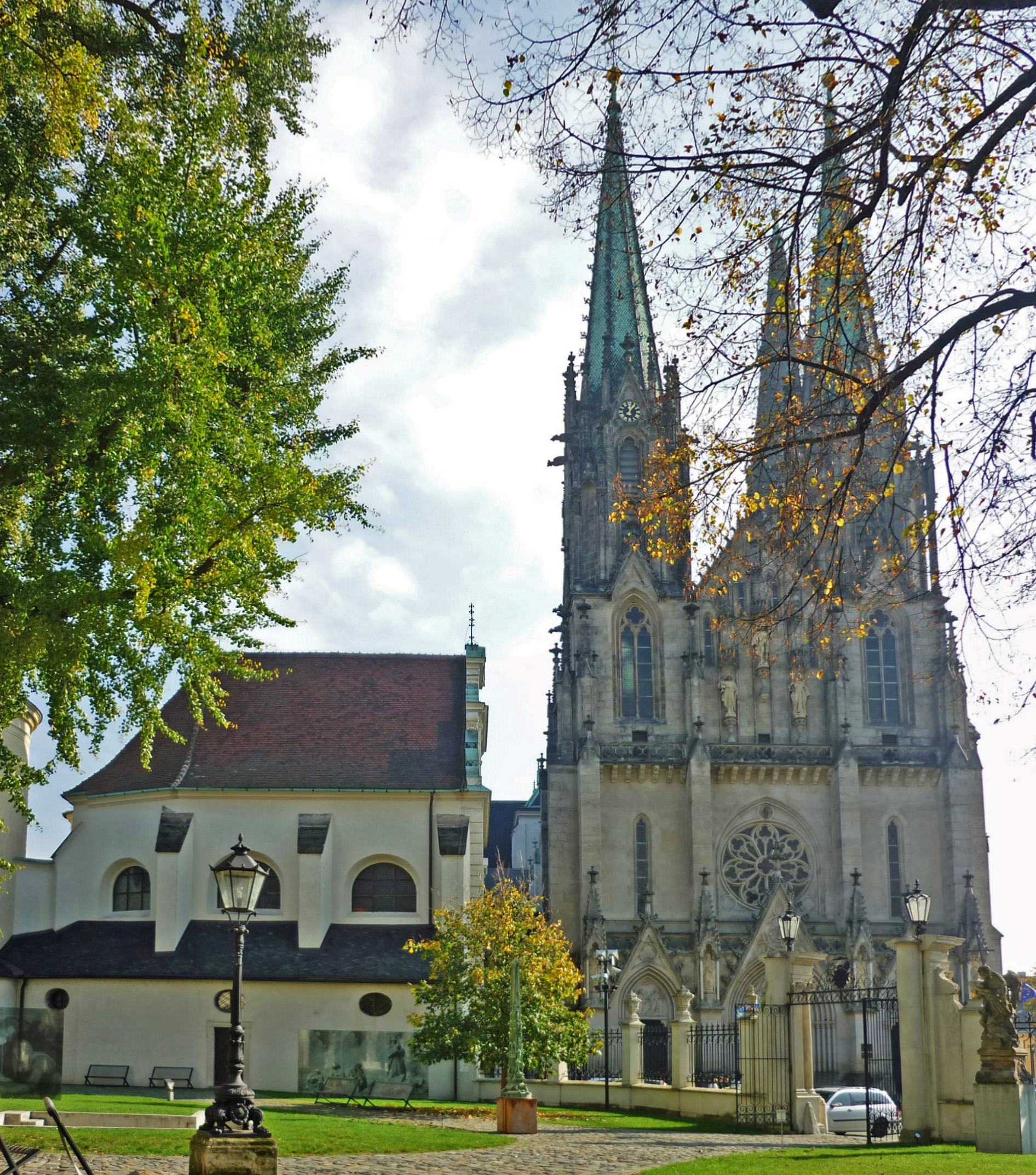 St. Wenzelskirche (Kathedrale) in Olmütz (Olomouc) in Mähren